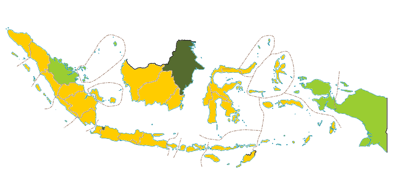 Provinsi-provinsi Indonesia menurut tingkatan PDRB per kapitanya Tinggi ($12.196 ke atas) Menengah ke atas ($3.946–12.195) Menengah ke bawah ($996–3.945)